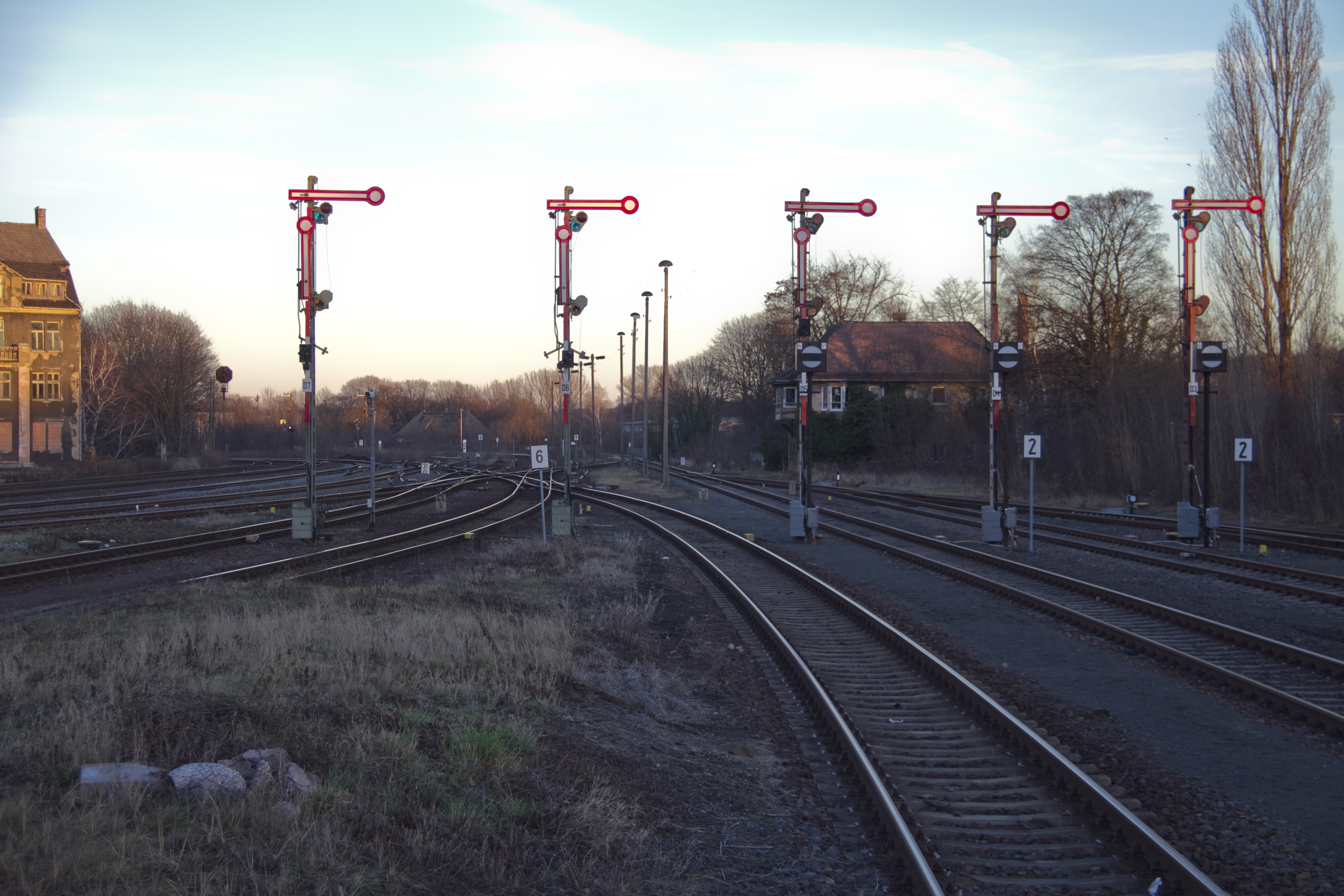 Bahnhof Zeitz, Signalanlagen